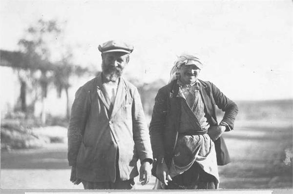 איכר ופועלים יהודים במושבה הישנה סג'רה